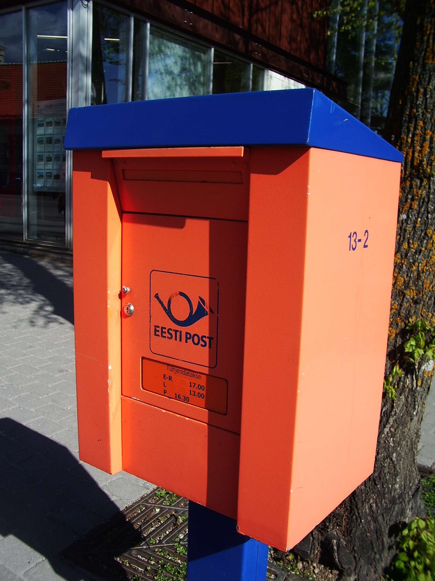 Kirjakast Kuressaares Ferrumi ees